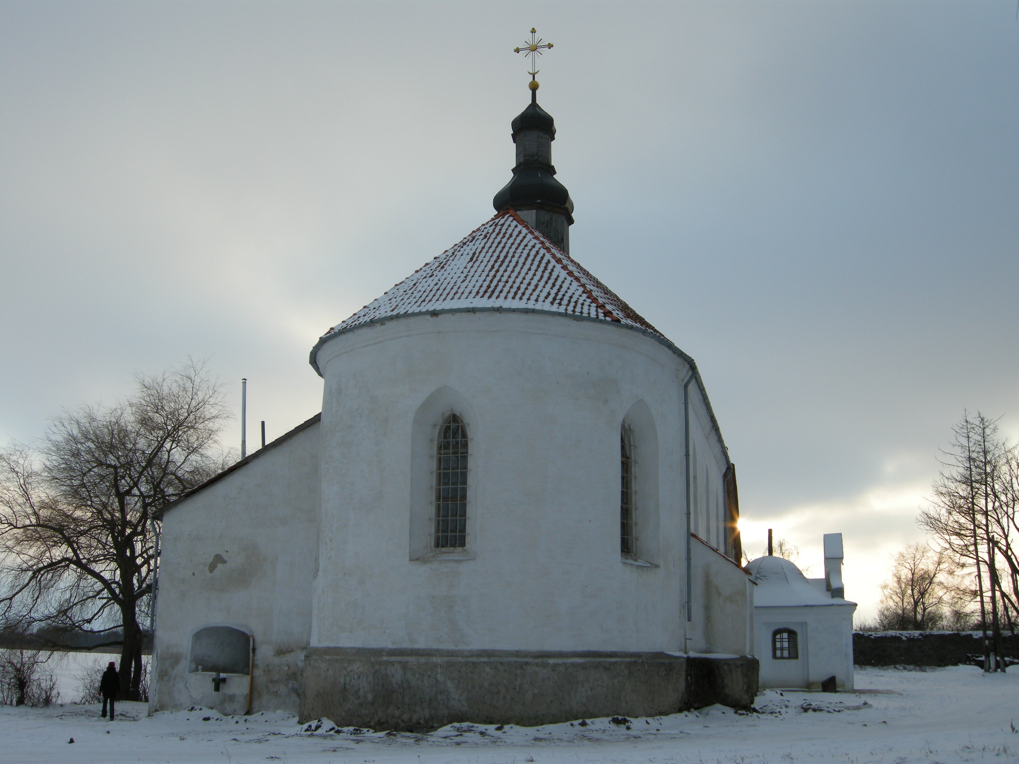 Церква Св. Трійці на замку.